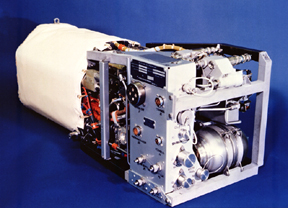 Alkaline Fuel Cell